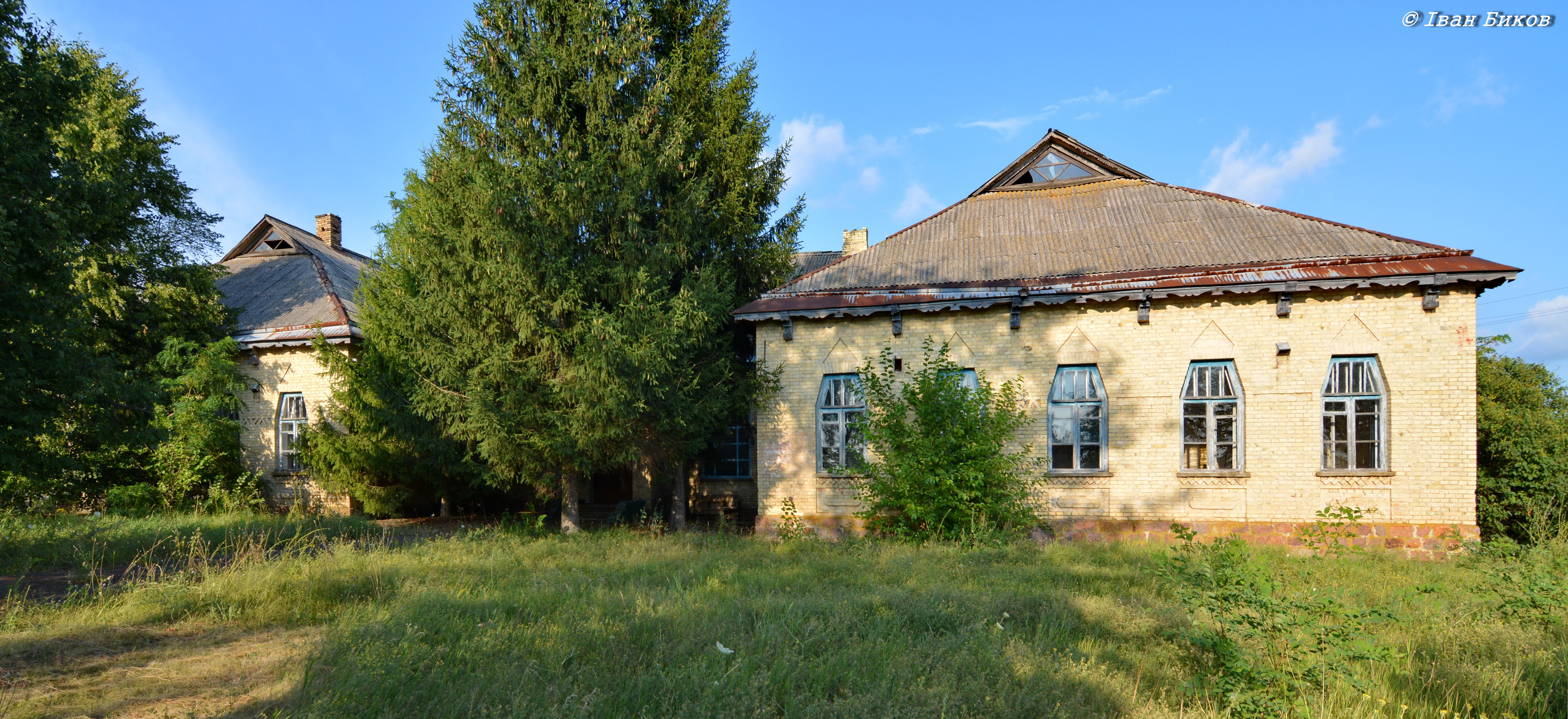 Земська школа в селі Пішки. Прибл. 1914 р. Український архітектурний модерн